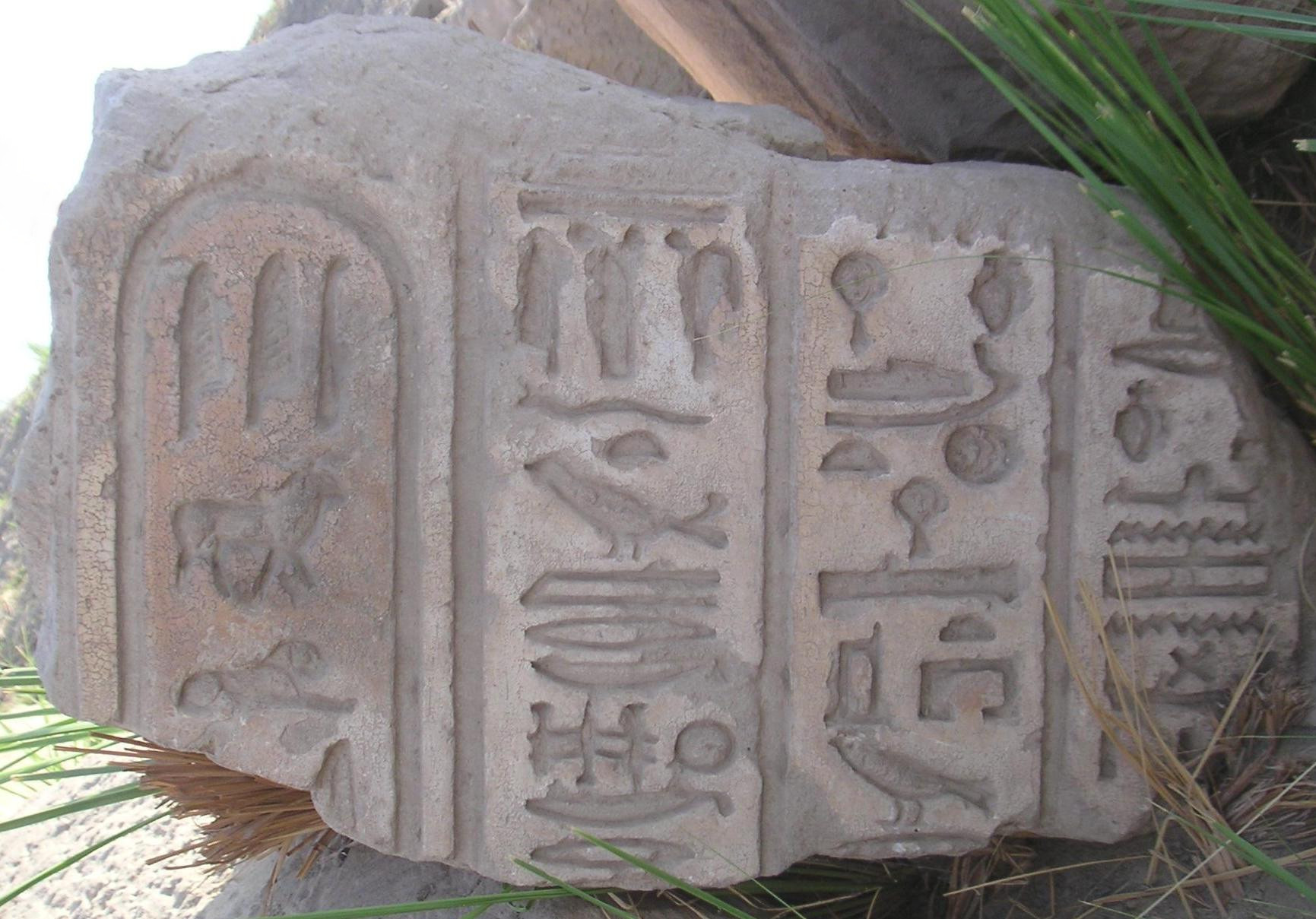 Bloc inscrit aux cartouches de l'empereur Tibère - 14 à 37 de notre ère. Temple de Montou de Medamoud.